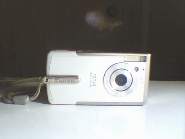 Canon DIGITAL IXUS i数码照机正面观。此照片是我（陈少举）拍摄的。我允许此照片进入公共领域。